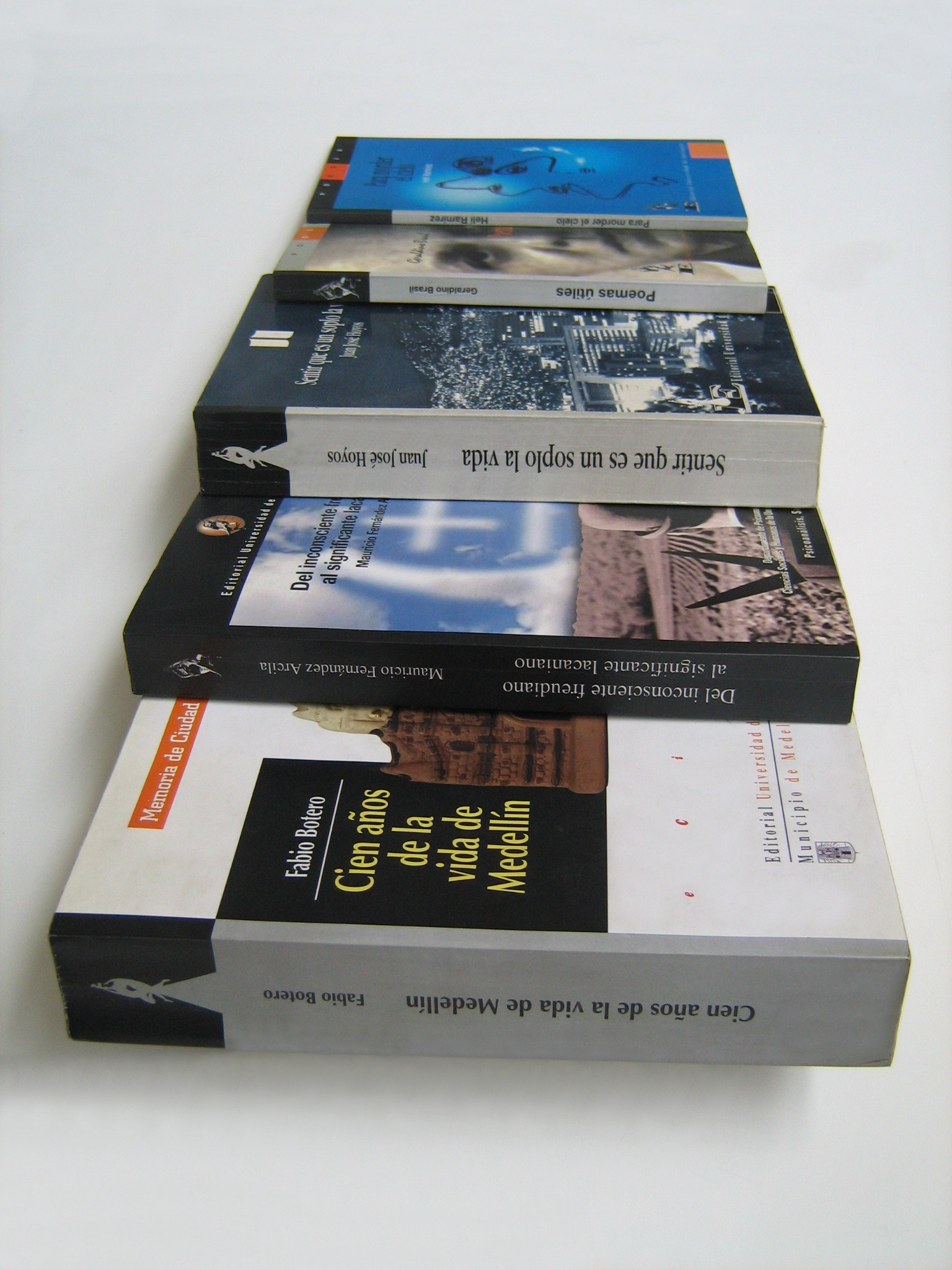 Libros de la Editorial Universidad de Antioquia impresos por la Imprenta Universidad de Antioquia. Medellín. Colombia